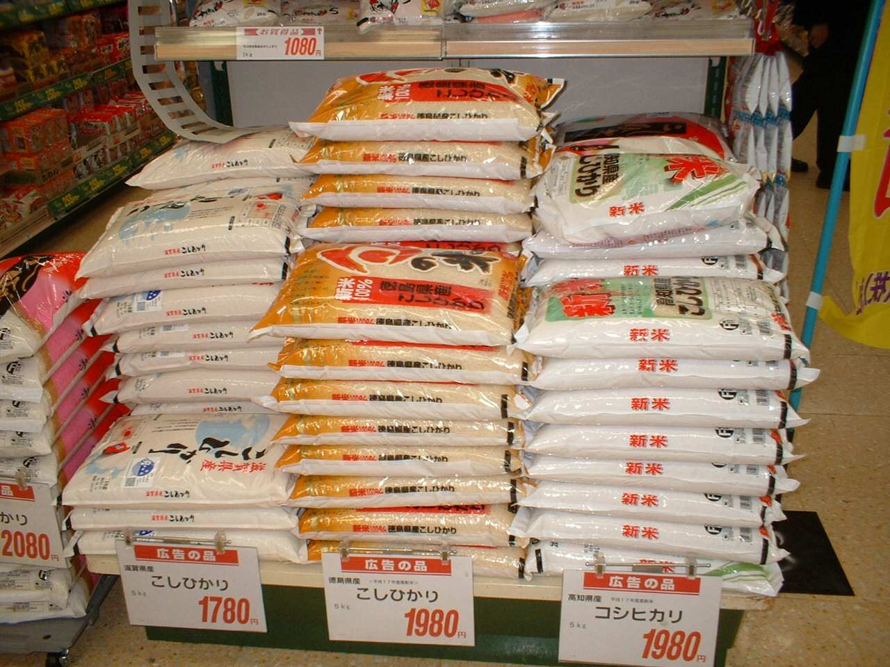 Rice bags (5kg) (スーパーで売っている米)